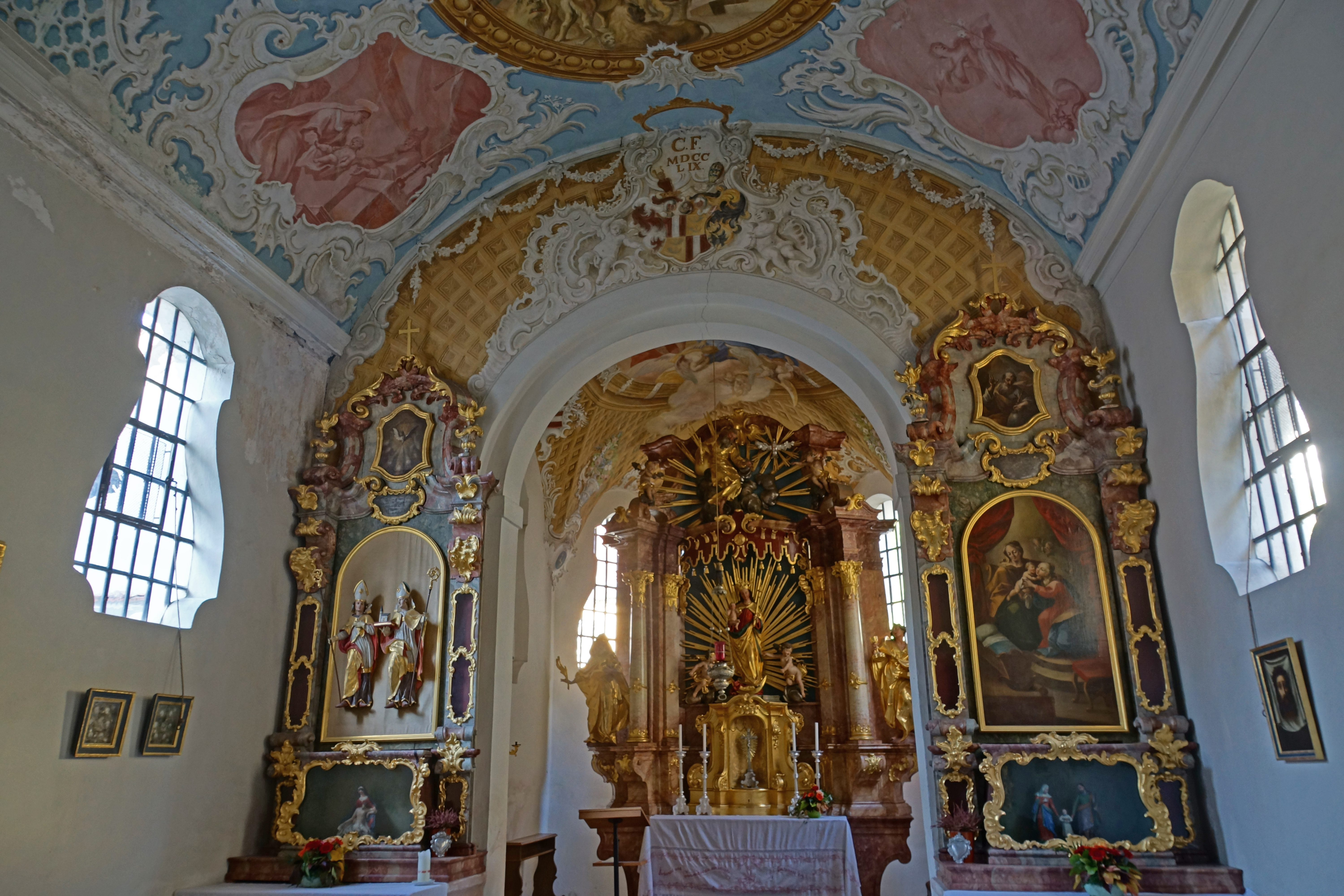 2012-10-06 Landshut 079 Altstadt, Thekla Kapelle